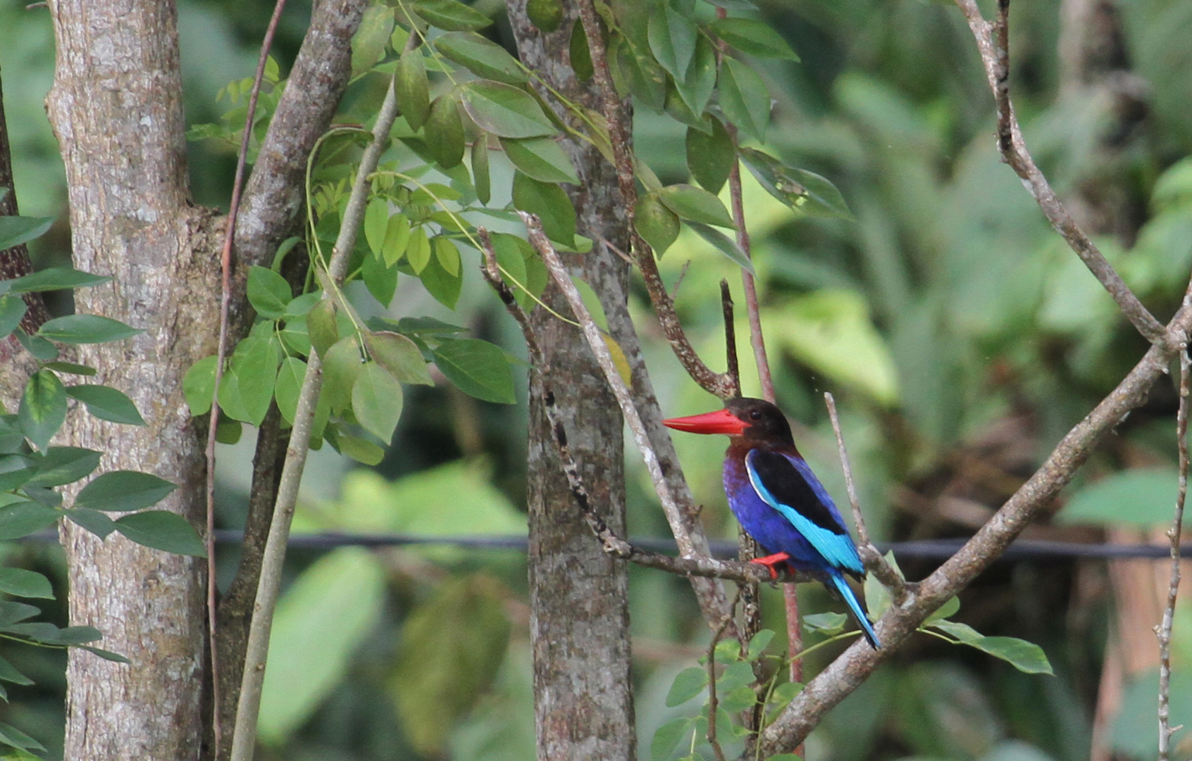 Martin-chasseur de Java dans une rizière balinaise